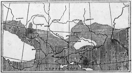 Наш край в середині третичної доби (так званого міоцену): глубоке море; перештриховане впоперекTemplate:—мілка вода, солодка; білі, незаштриховані місцяTemplate:—суша.